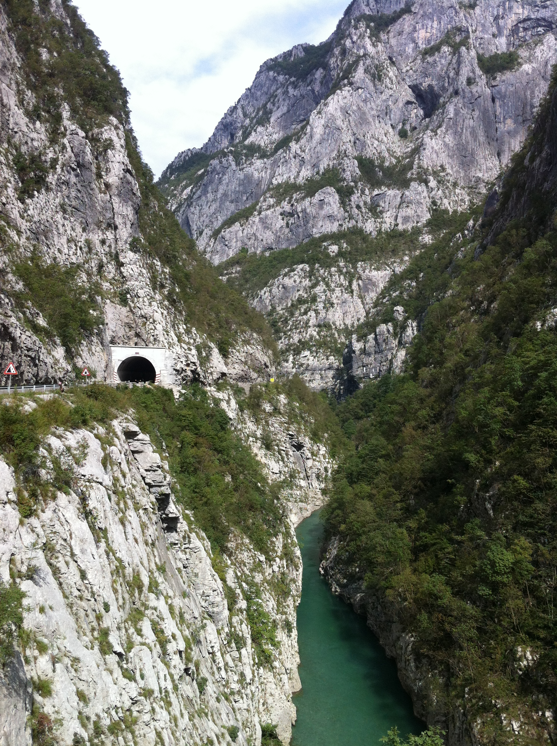 Kolašin Municipality, Montenegro